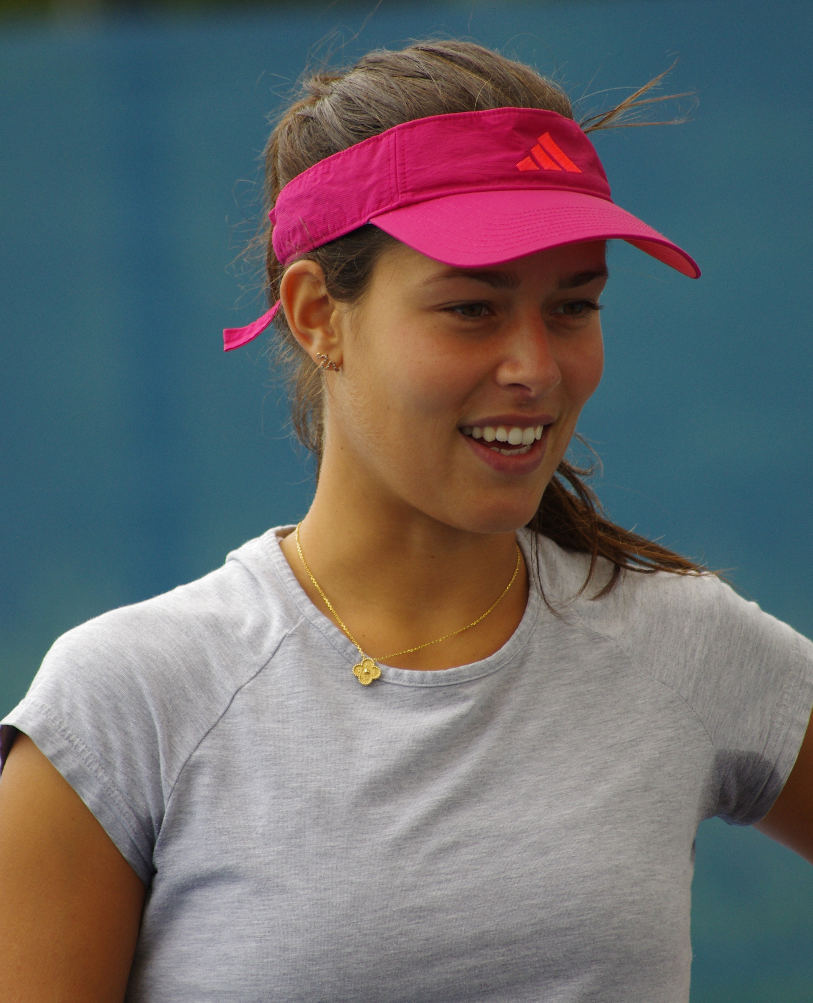 Ana ivanovic